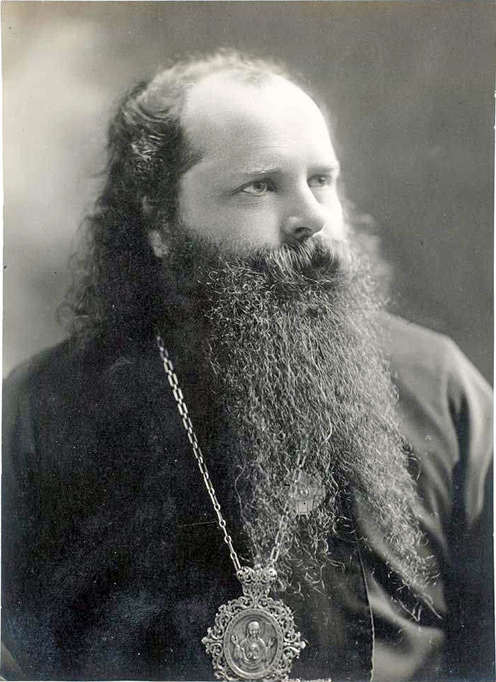 Bishop Innocent (Pustynsky)